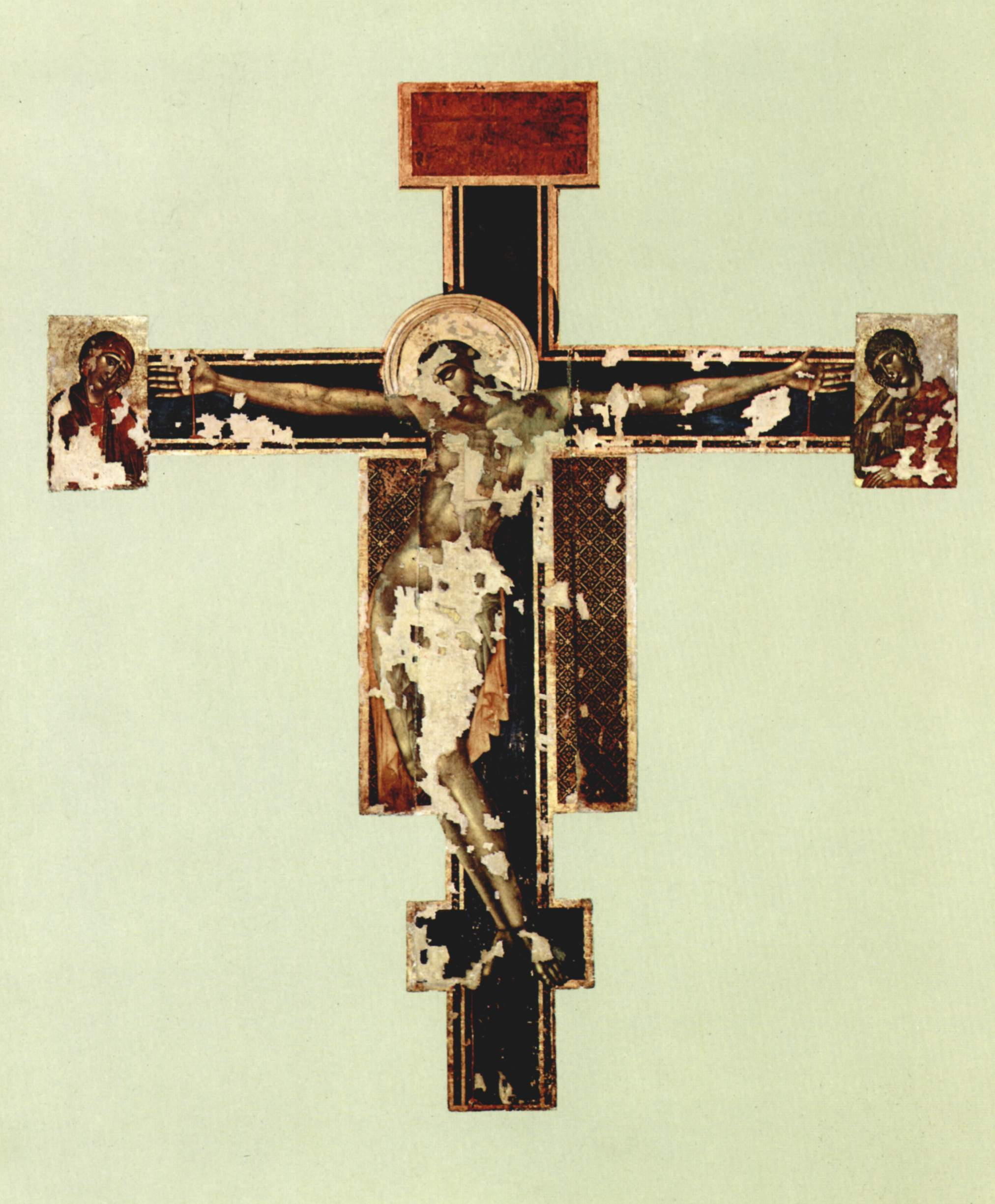 state after flooding in 1966